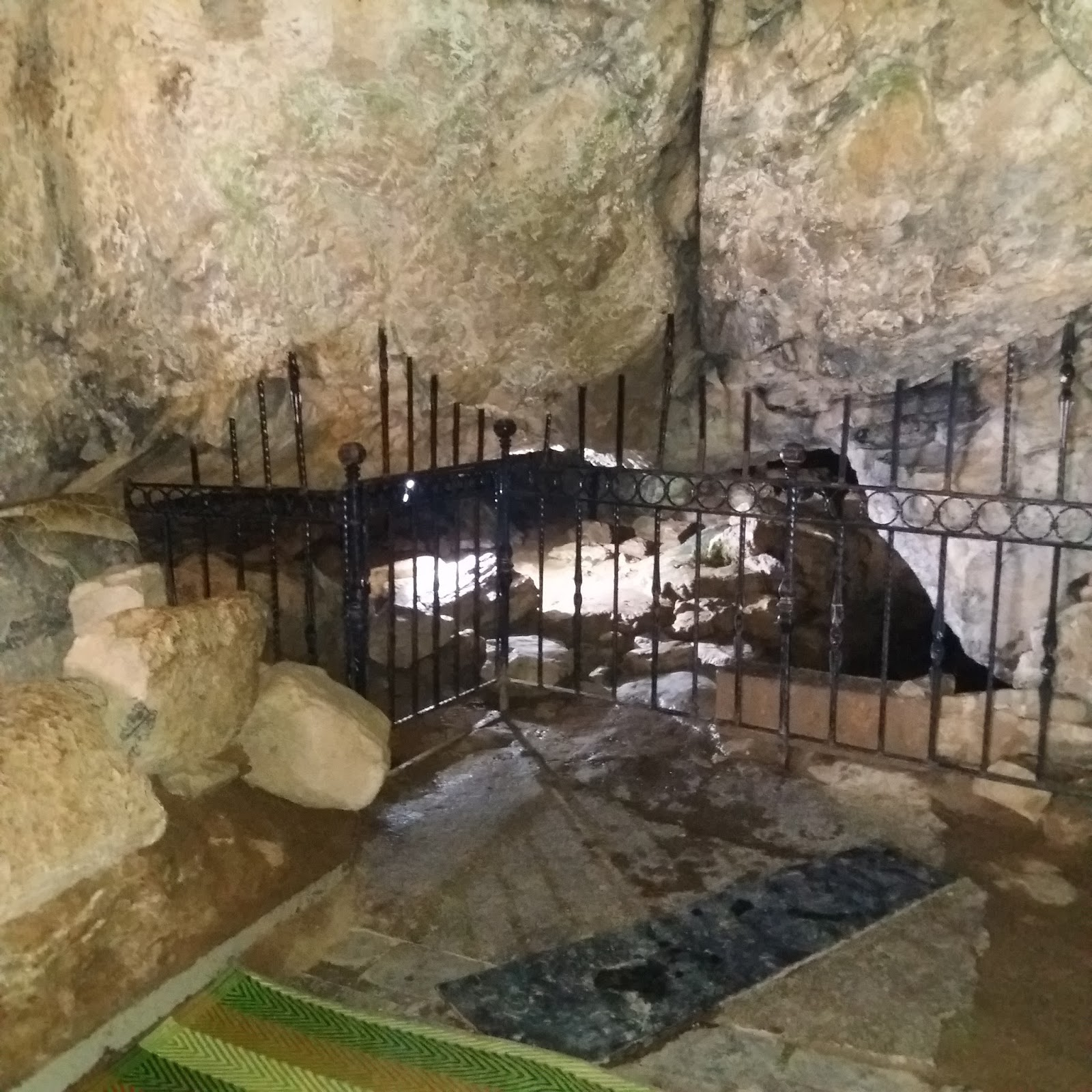 Afşin Ashab-ı Kehf